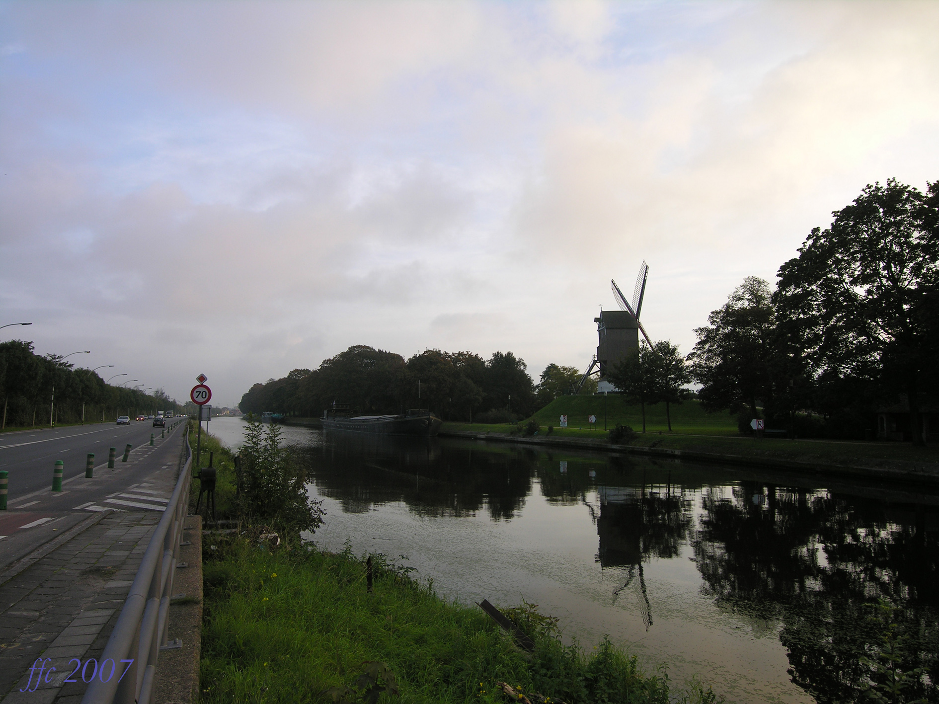 Kanaal Gent-Brugge in Brugge